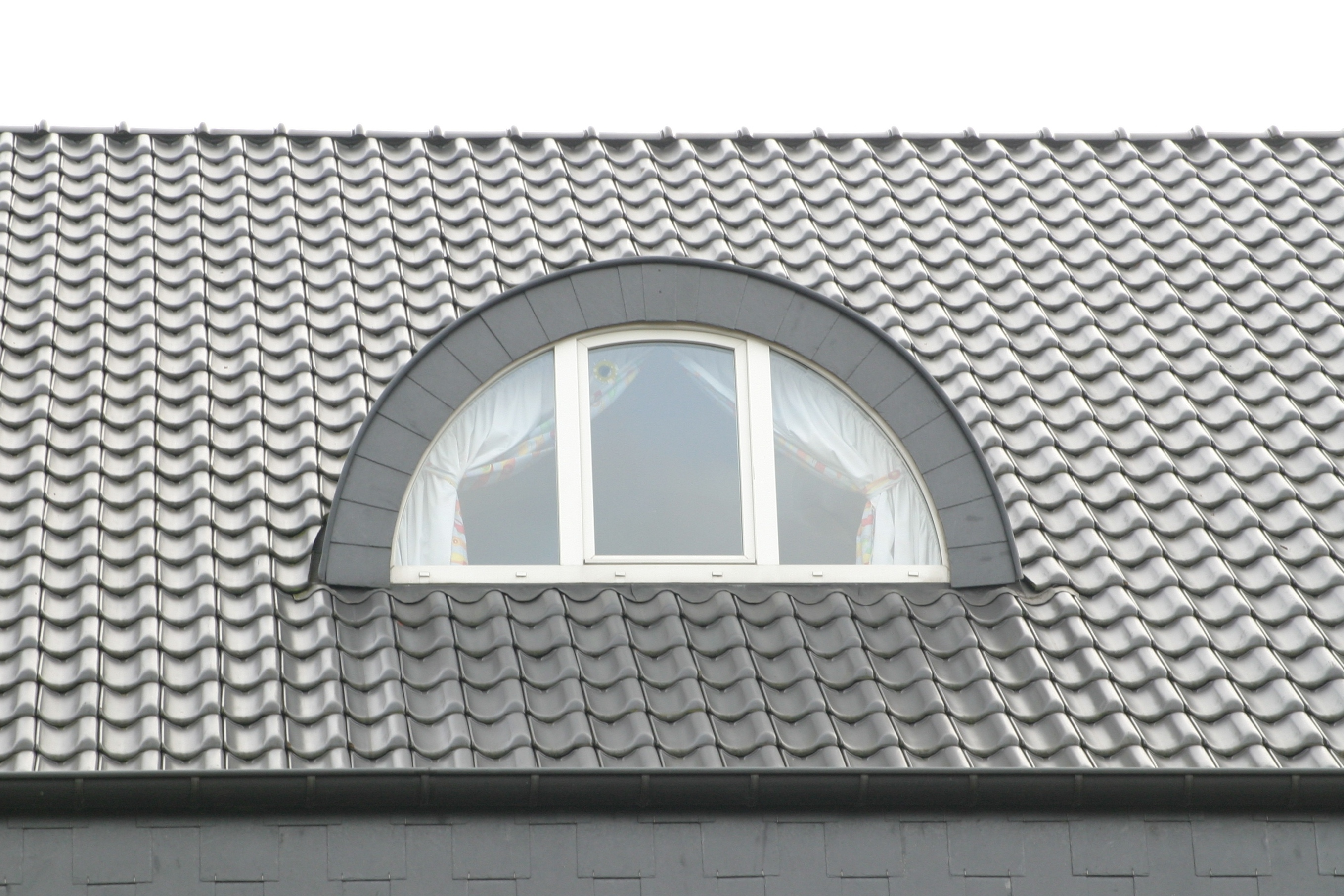 Eng hallefronn Käik.